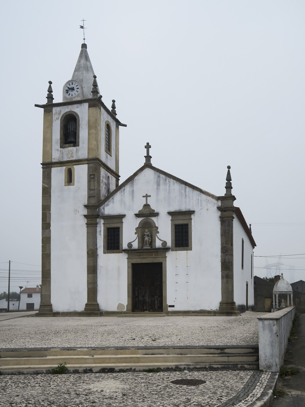 Igreja da Trofa, Águeda